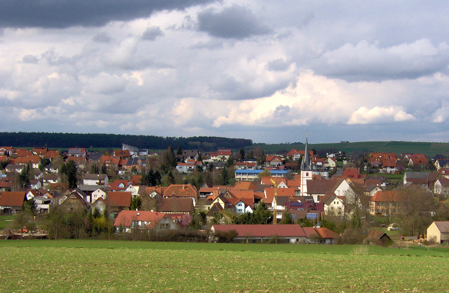 Blick von Sueden auf Amlingstadt - View from south